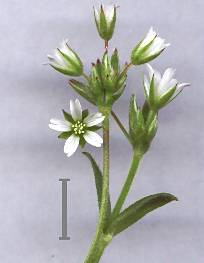 Cerastium holosteoides